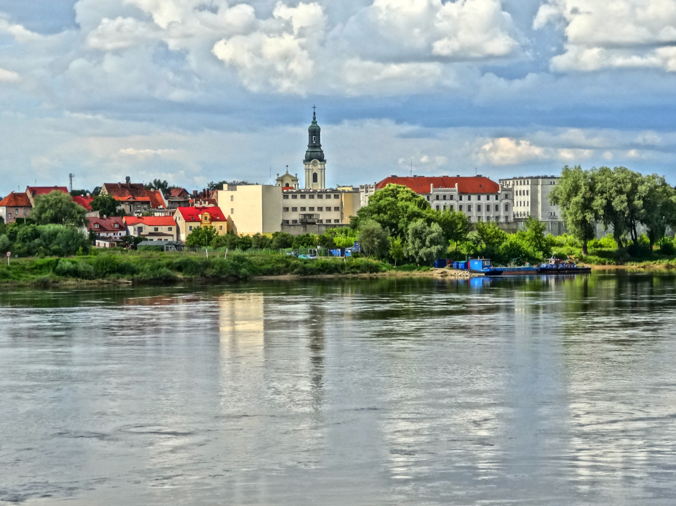 Widok Starego Fordonu (dzielnicy Bydgoszczy) od strony Wisły, widoczny m.in. kościół św. Mikołaja